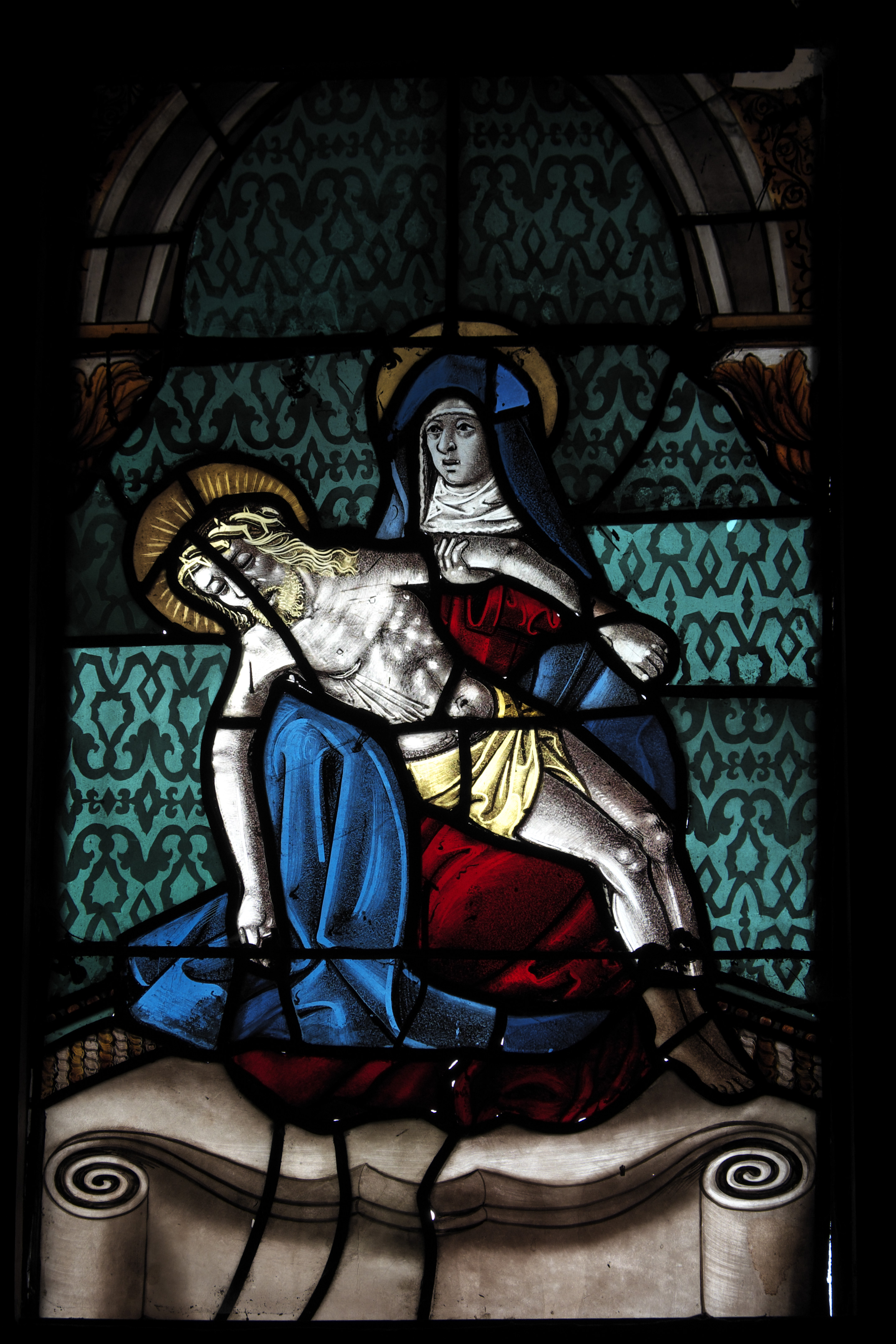 Katholische Kirche Exaltation-de-la-Sainte-Croix in Bailly-le-Franc im Département Aube (Champagne-Ardenne/Frankreich), Bleiglasfenster aus dem 16. Jahrhundert, Darstellung: Piétà